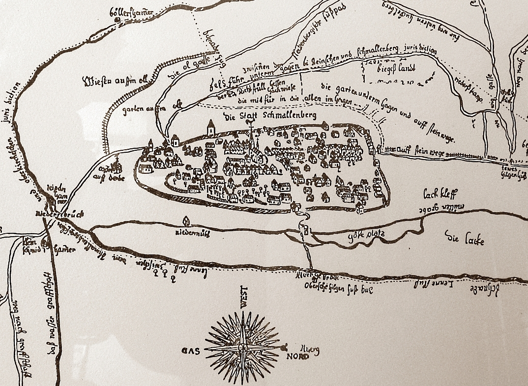 Statt Schmallenberg, 1724 (Germany)